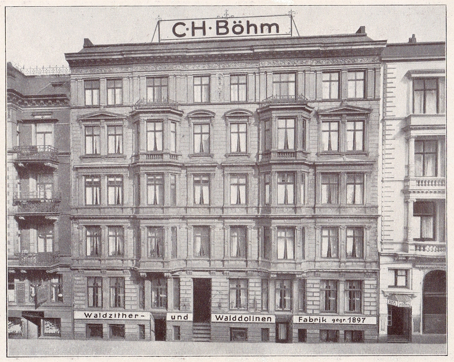 Das Geschäftsgebäude der Firma Böhm, wie es im Katalog von 1926 abgebildet ist.